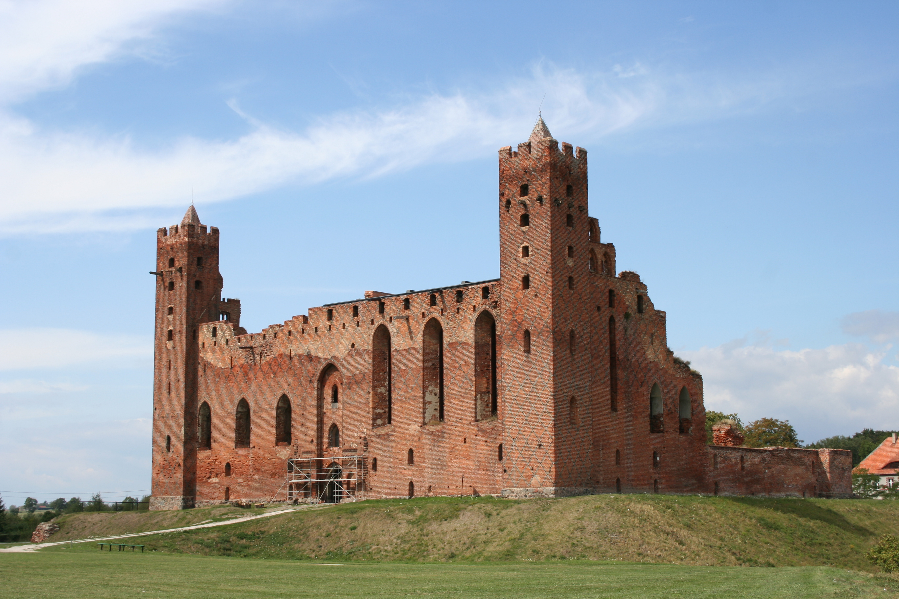 Radzyń Chełmiński, ruiny zamku, 2 poł. XIII - 1 poł. XIV